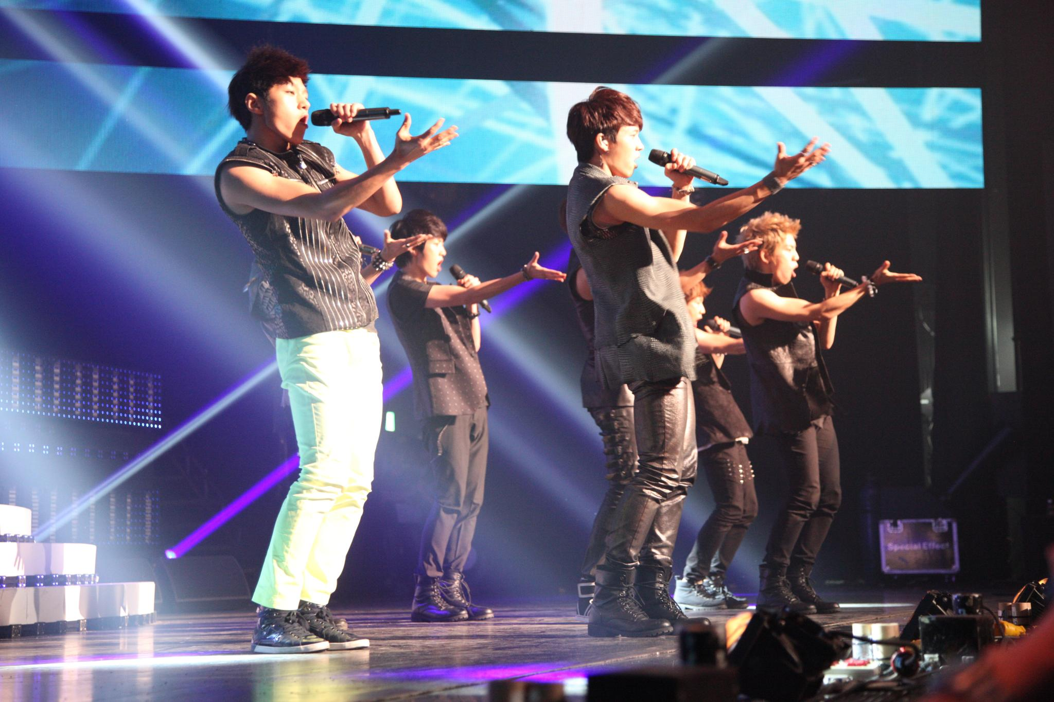 인피니트- 싸이월드 드림 뮤직 페스티벌에서